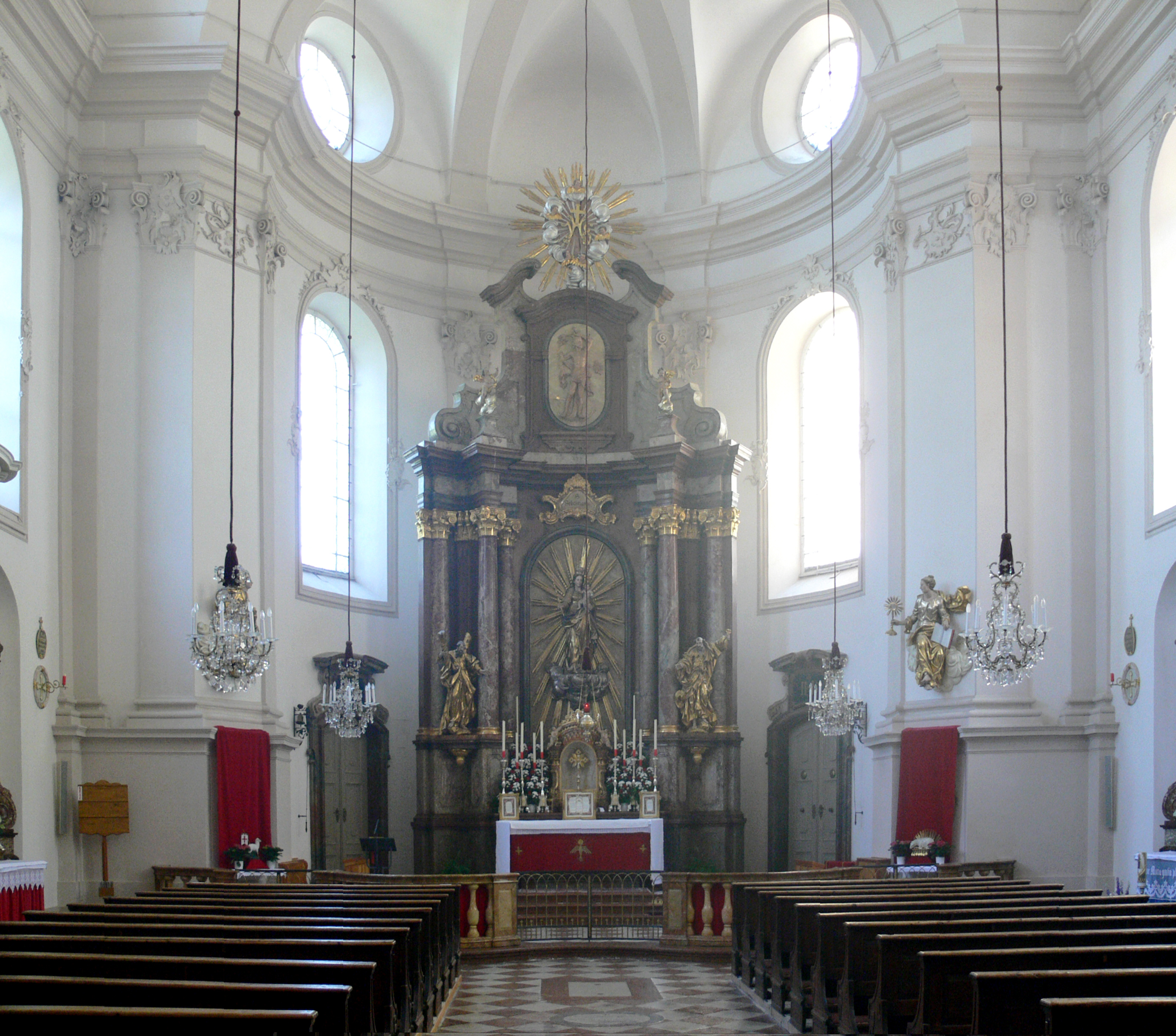 Sebastianskirche (Neustadt, Linzer Gasse 41), Salzburg Innenansicht